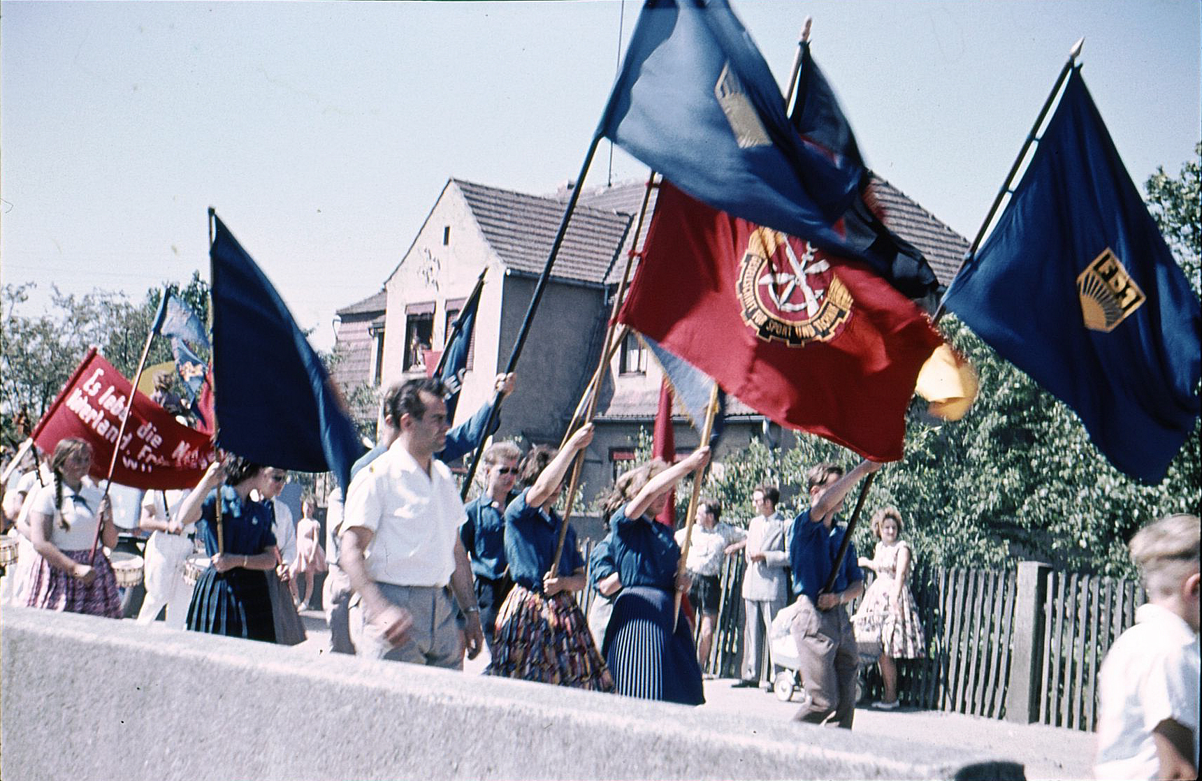 Fest-Umzug Biehla